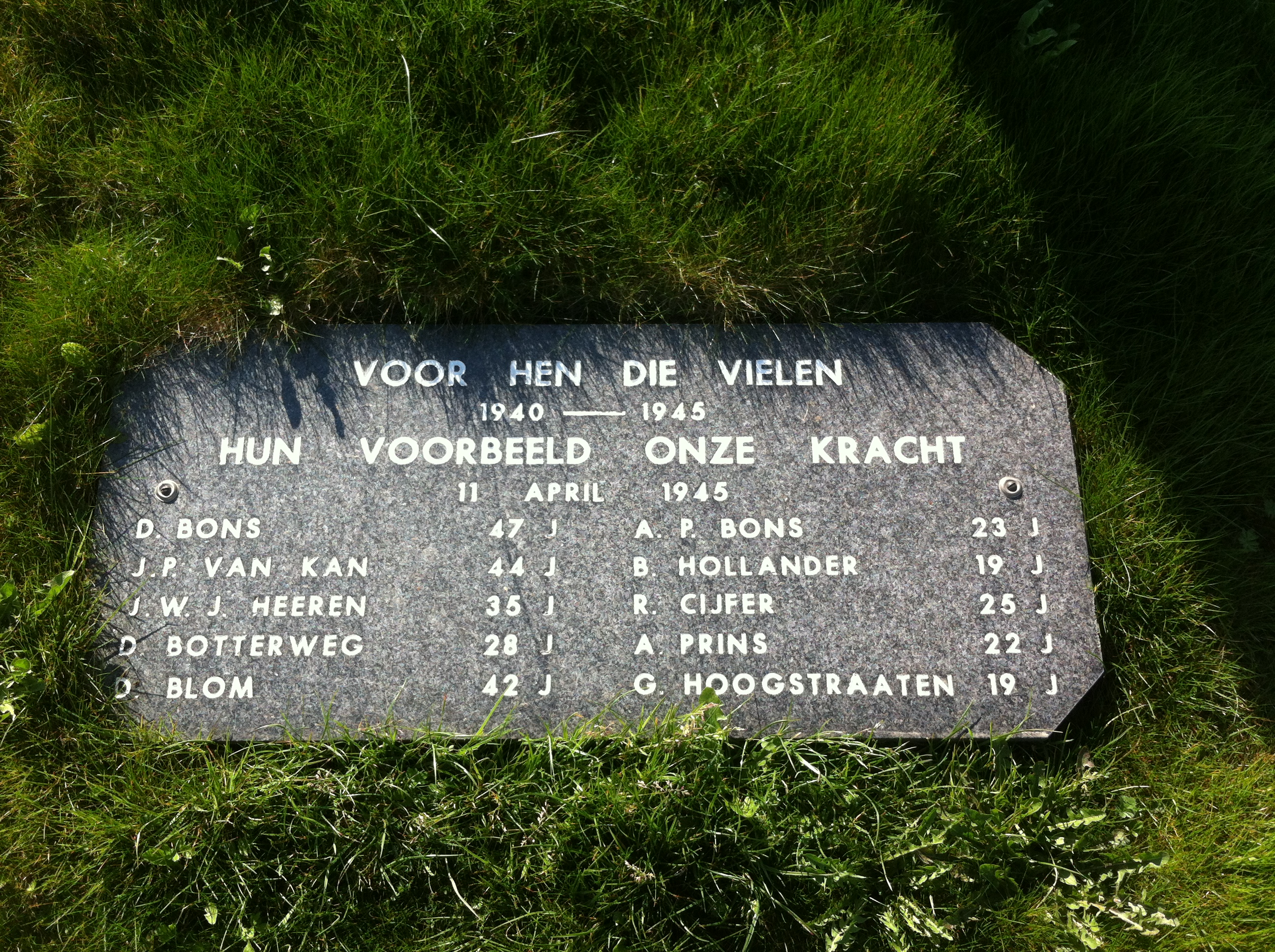 Detail van het monument 'De tragedie van Zijpersluis' in Zijpersluis (voormalige gemeente Zijpe).